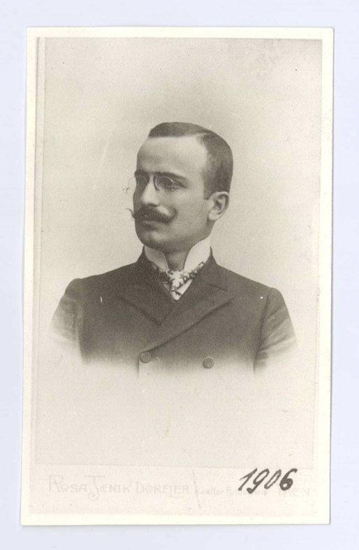 Панчо Дорев